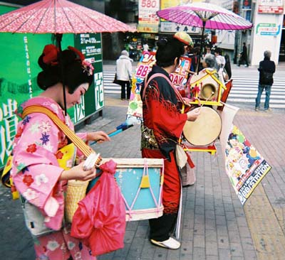 チンドン屋。高田馬場で撮影。